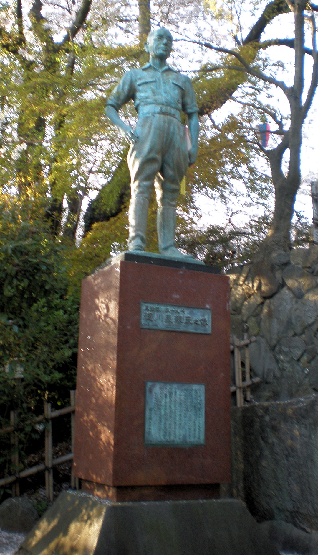 愛知県小牧市の小牧山にある徳川義親のブロンズ像